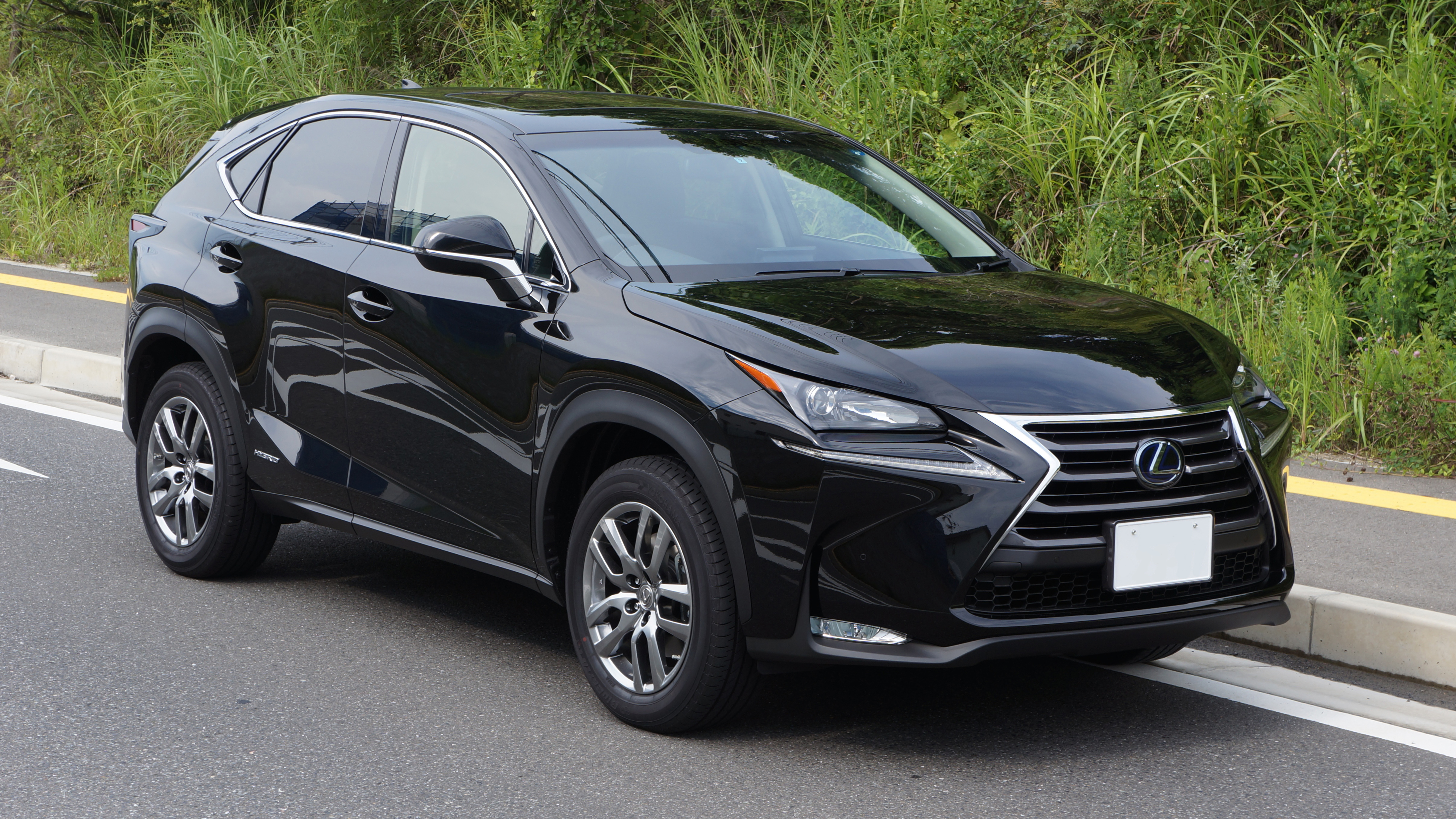 LEXUS NX300h Japan 2014 Front